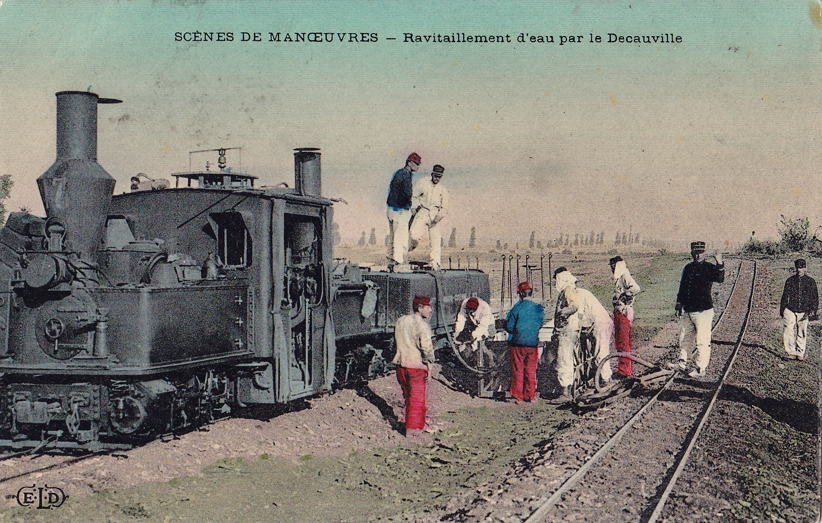 Carte postale ancienne éditée par ELD, collection Scènes de manœuvre : Ravitallement en eau par le Decauville